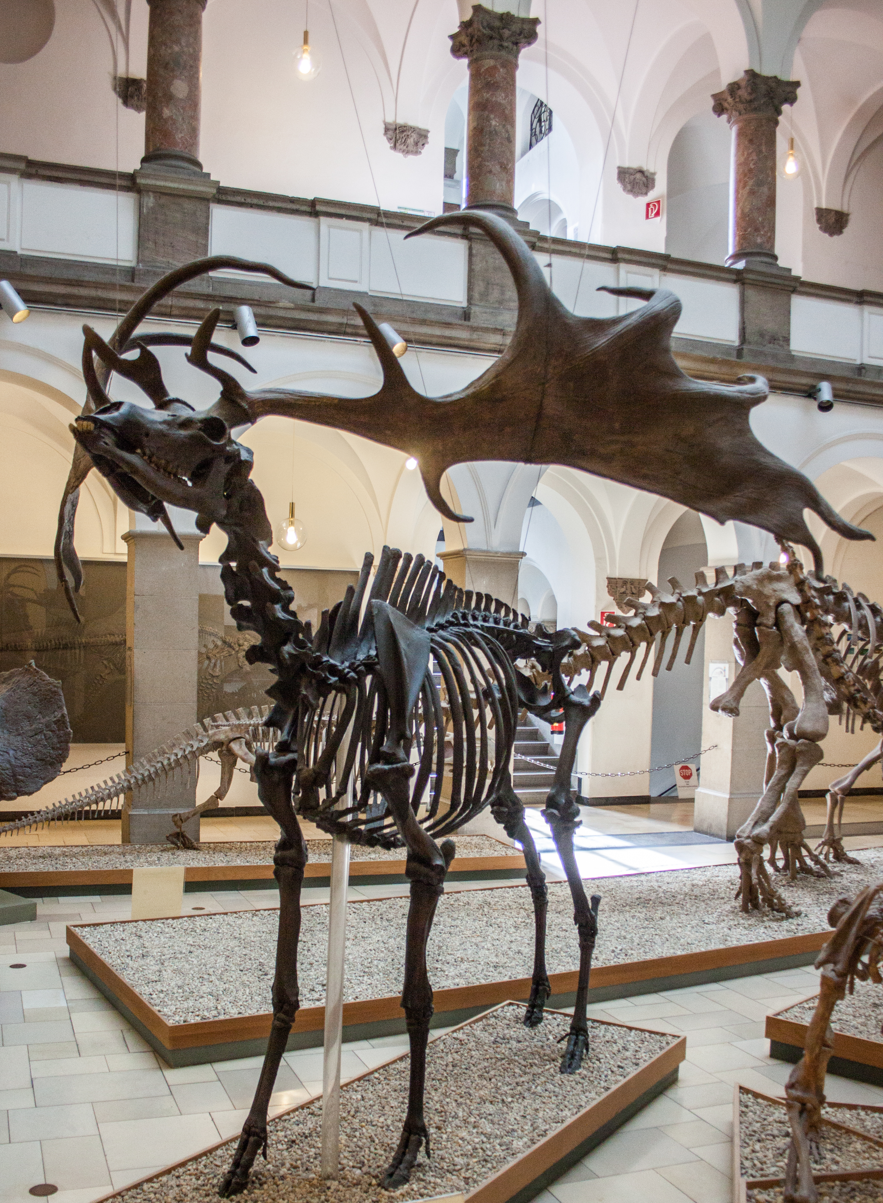 Monoclonius nasicornus